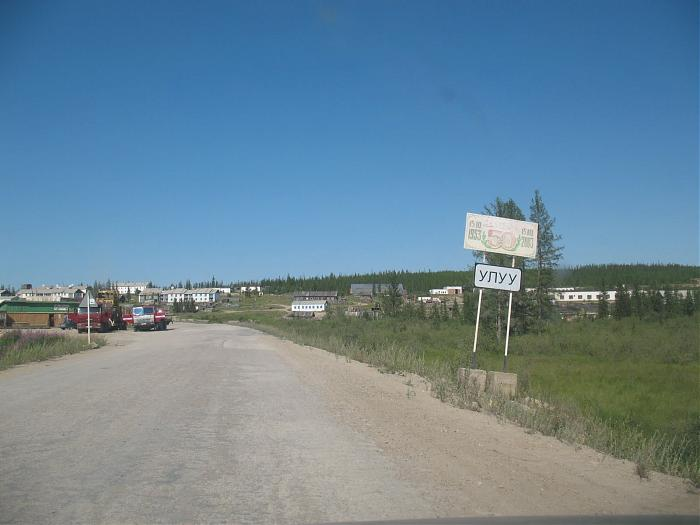 Поселок Улу, Алданский район, Якутия